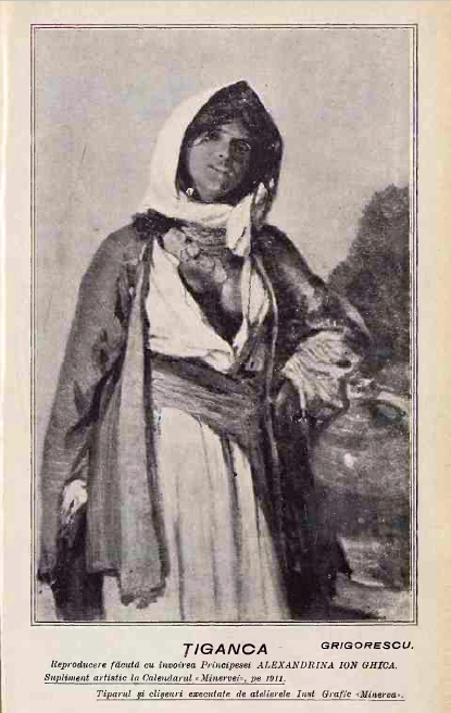 Tiganca din Ghergani publicată în anul 1911 în Calendarul Minervei